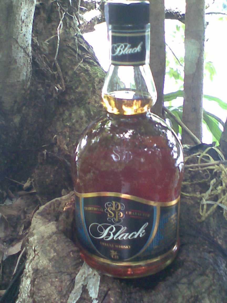 വിസ്ക്കി‌‌-മദ്യക്കുപ്പിയുടെ ചിത്രം-മദ്യം എന്ന ലേഖനത്തിനായി